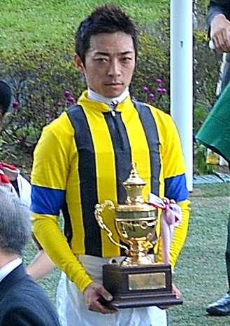 2015年7月12日に福島競馬場の第11競走で行われた「第51回七夕賞」で、グランデッツァで制覇して表彰される川田将雅騎手を、観客席から撮影したもの。